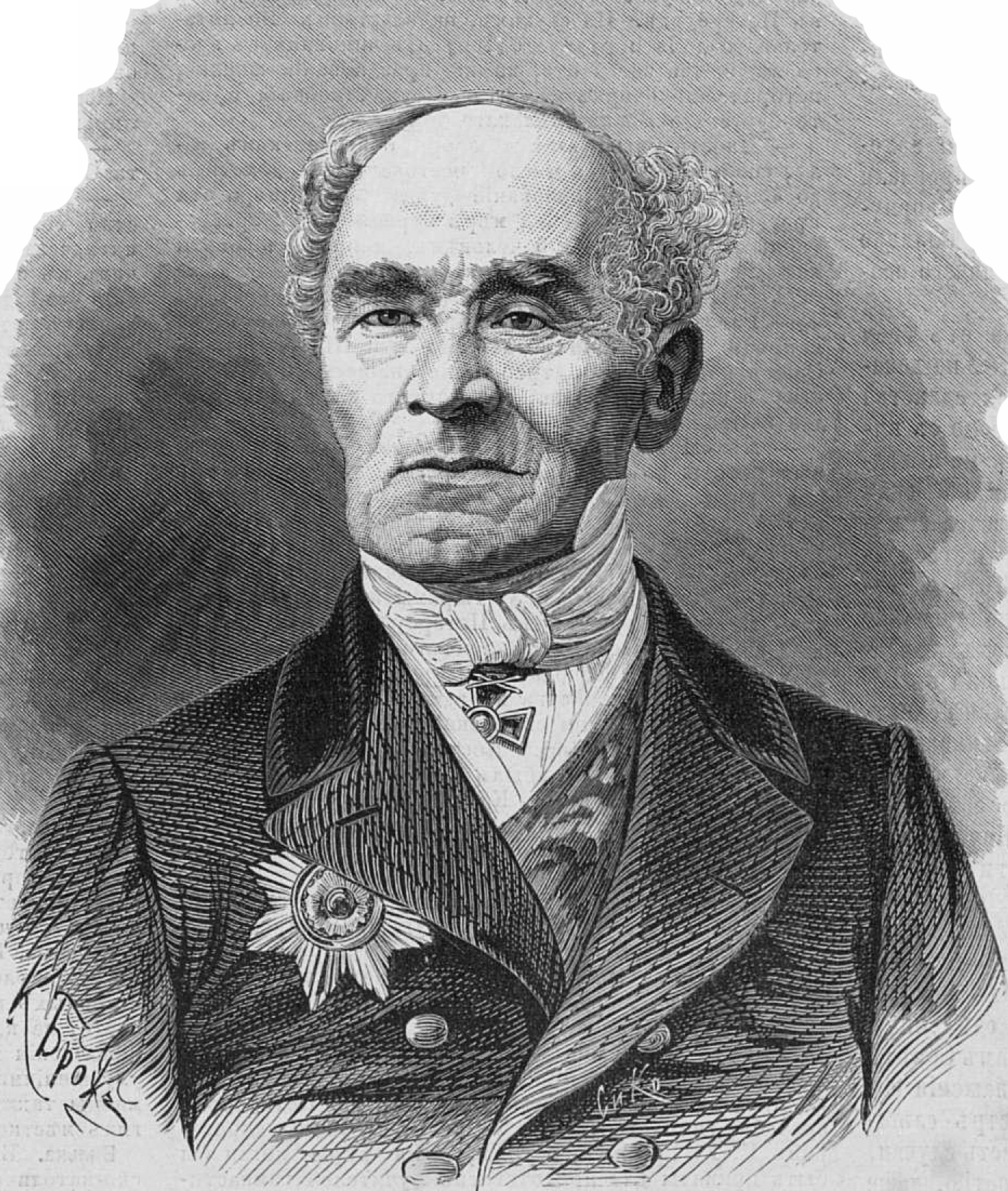 Вельтман Александр Фомич, 1860-е годы